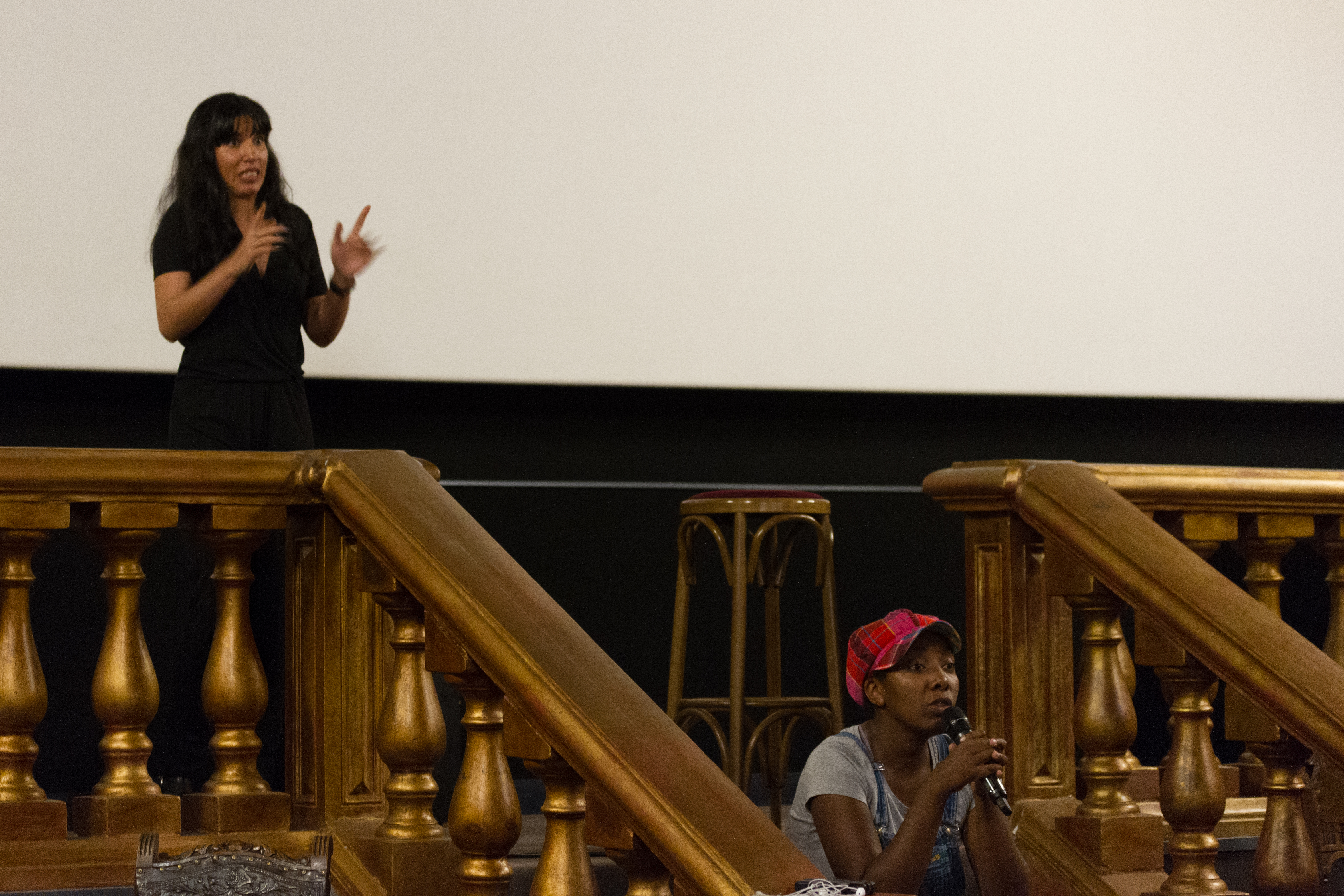 Projection-Débat d'Ouvrir la Voix à l'American Cosmograph